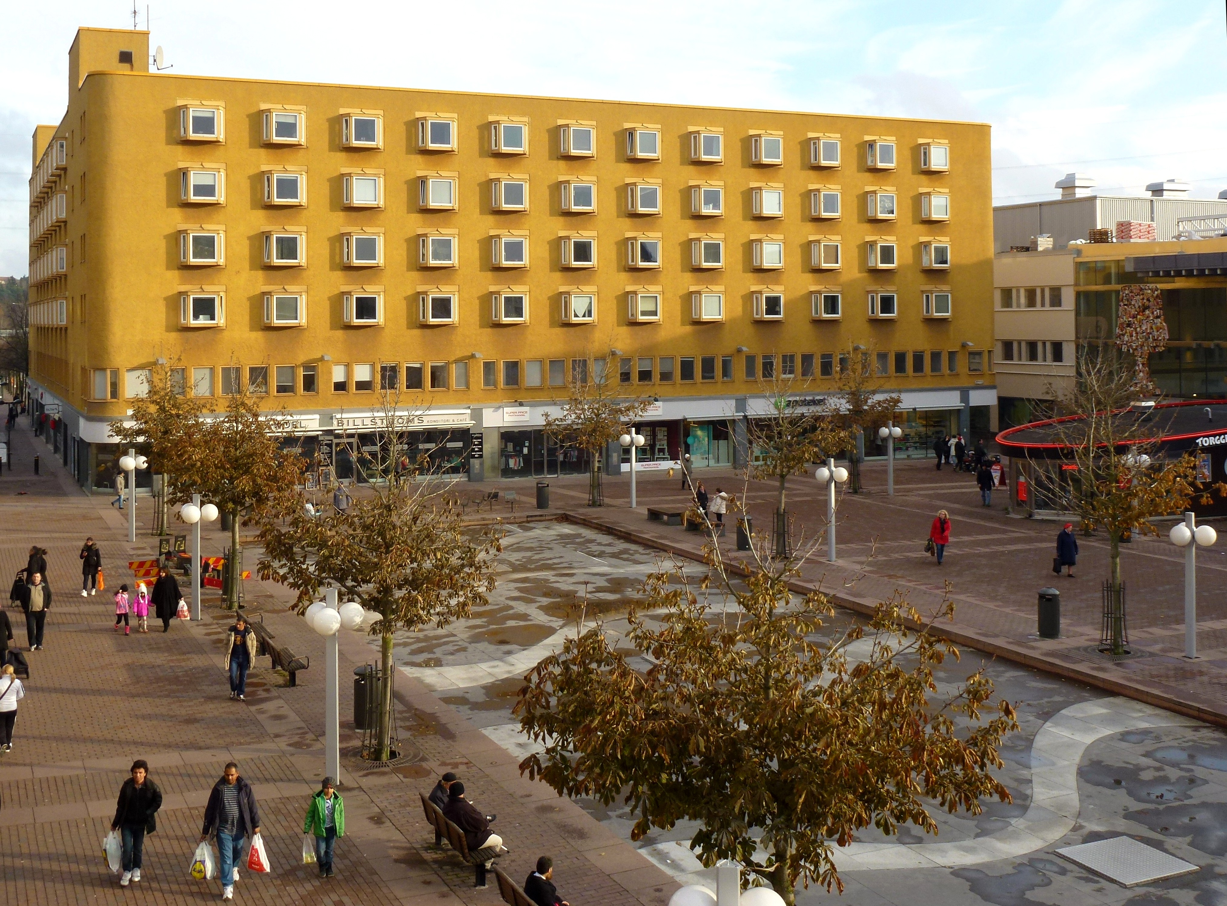 Gula huset i Skärholmens centrum, kvarteret Måsholmen, ritat av Hans Borgström 1973-1975